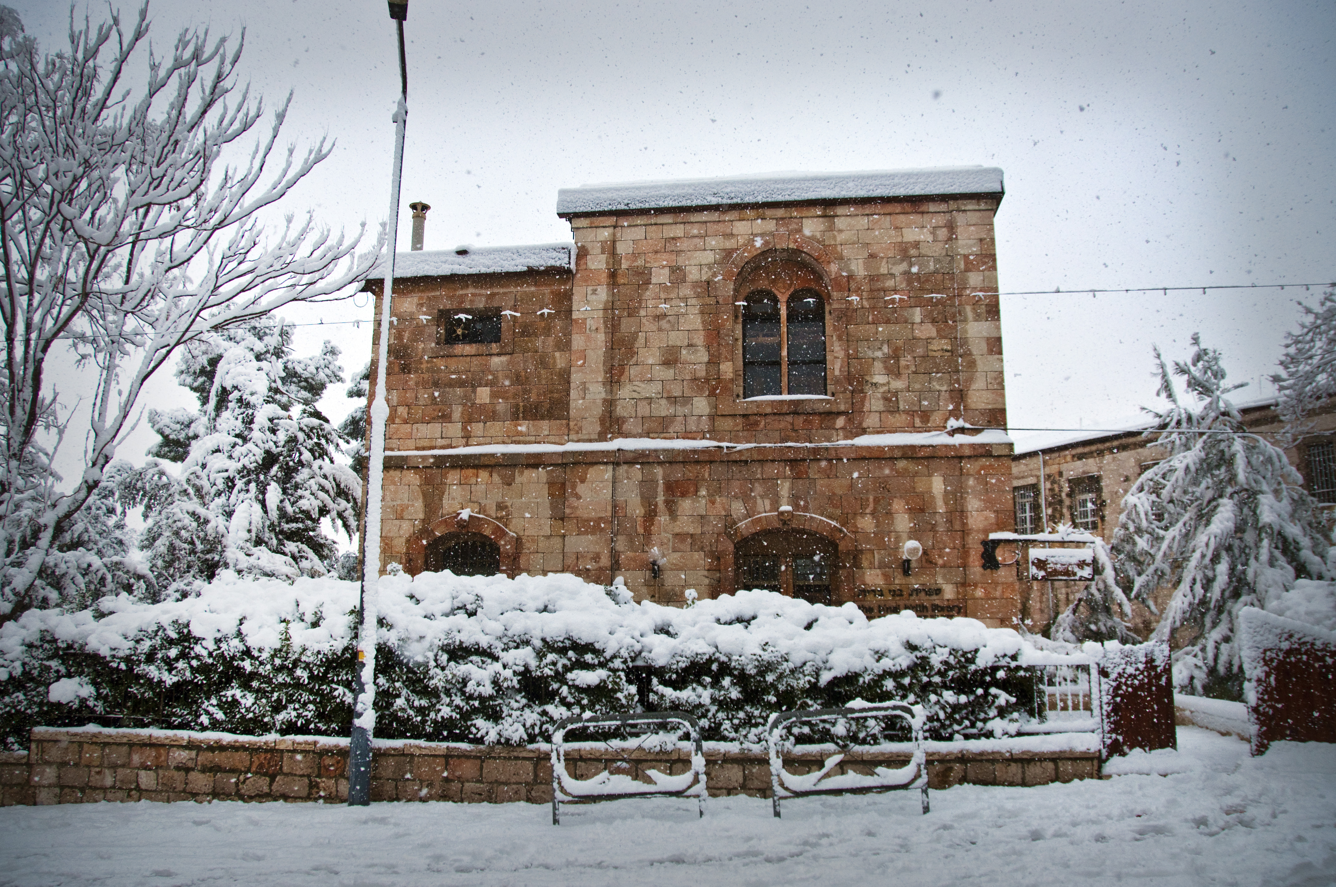 ספריית בני ברית או בית נאמן היה מבנה שהוקם על ידי ארגון בני ברית ושימש בתחילת המאה ה-20 כספרייה ובסיס למה שהיווה בהמשך הספרייה הלאומית בירושלים. כיום משמש את "הסתדרות הרבנים של ארצות הברית" ואת הרבנות הצבאית במדרשה לקיום הרצאות ושיעורי תורה לחיילי צה"ל.